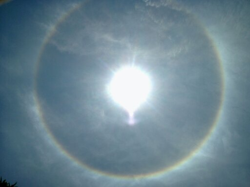 sol con arcoiris